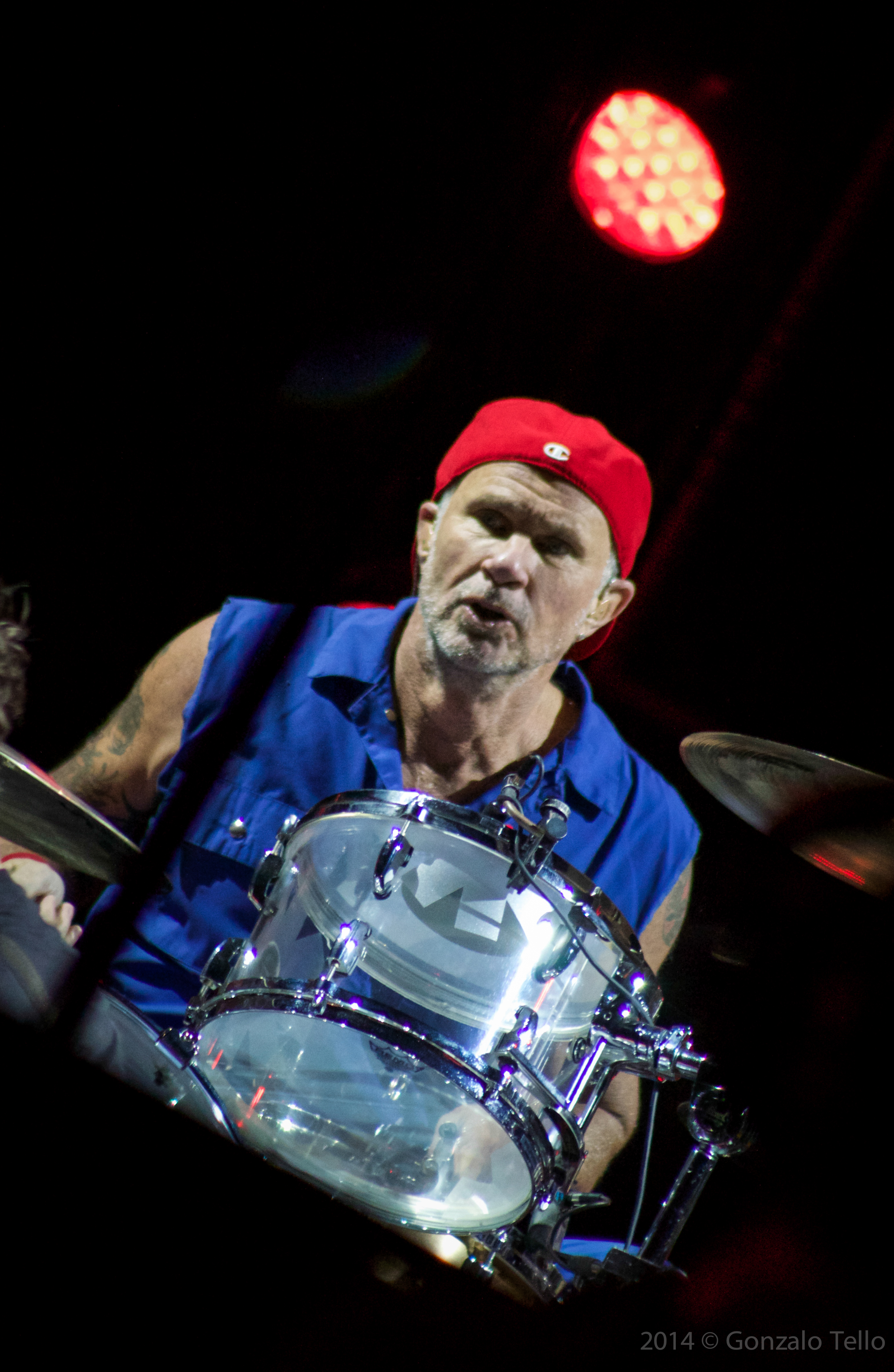 Foto: Gonzalo Tello Todos los derechos reservados